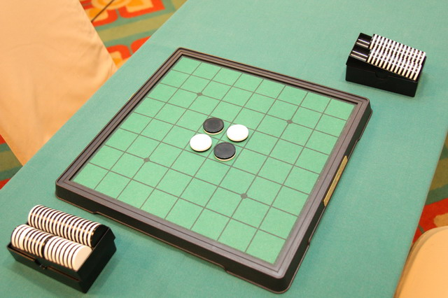 กระดานโอเทลโล่มาตรฐานที่ใช้แข่งขัน